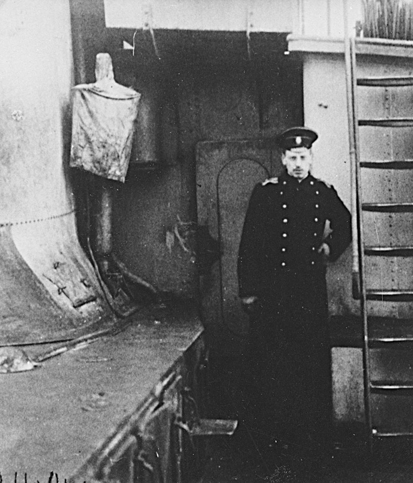 Гаральд Карлович Граф в годы Первой мировой войны на эсминце «Новик»